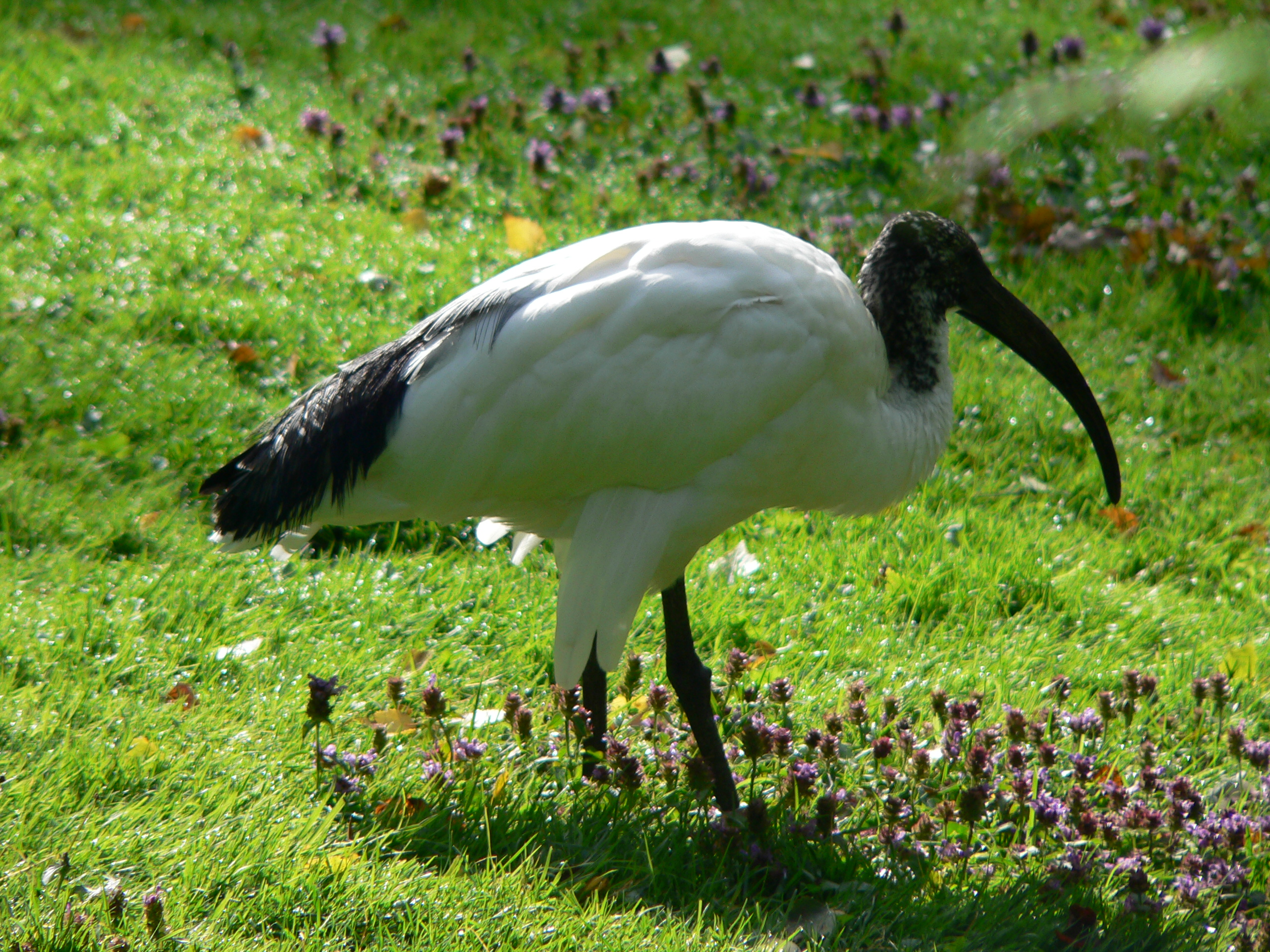 Heiliger Ibis Threskiornis aethiopicus